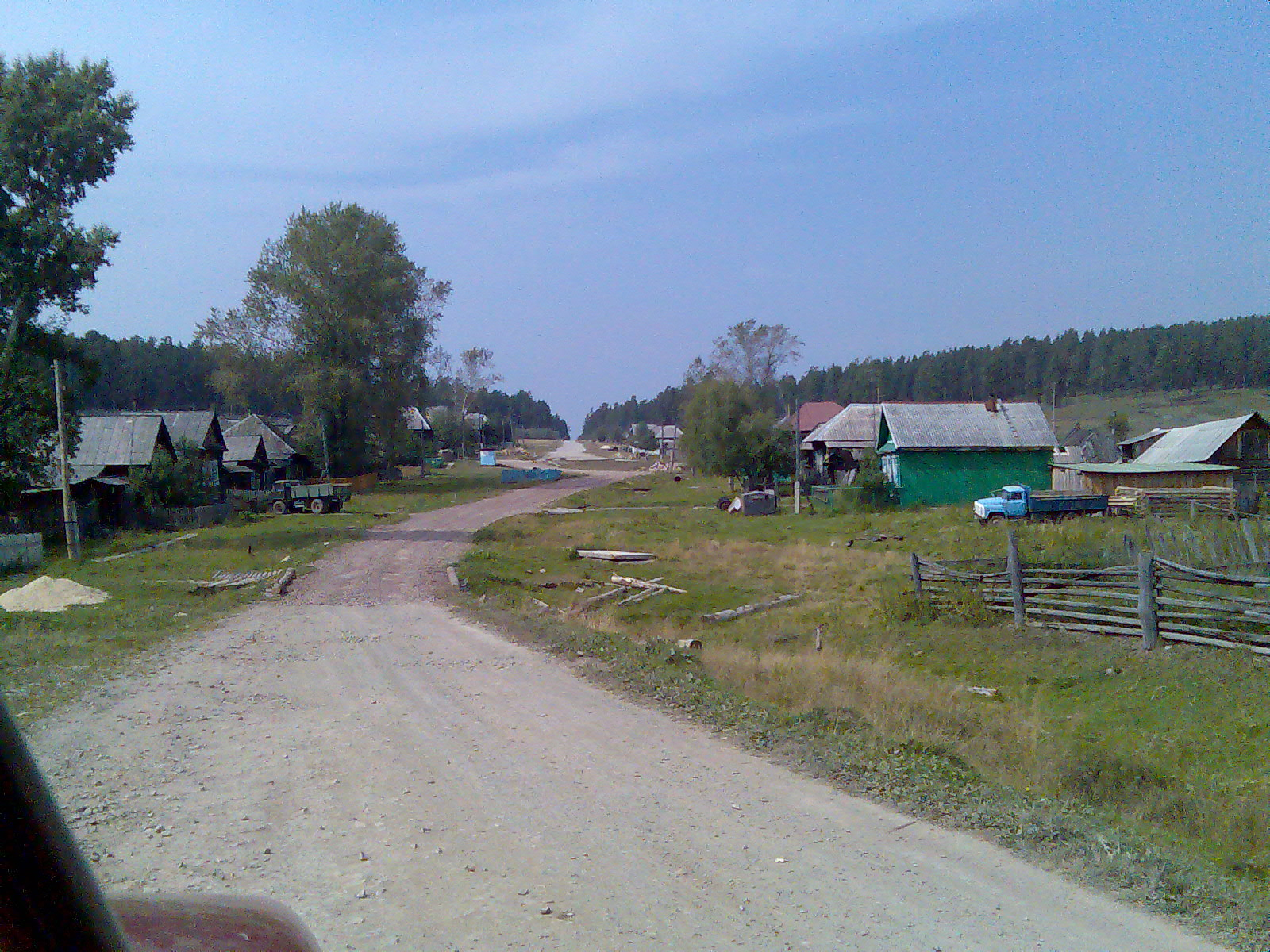 Деревня Меседа